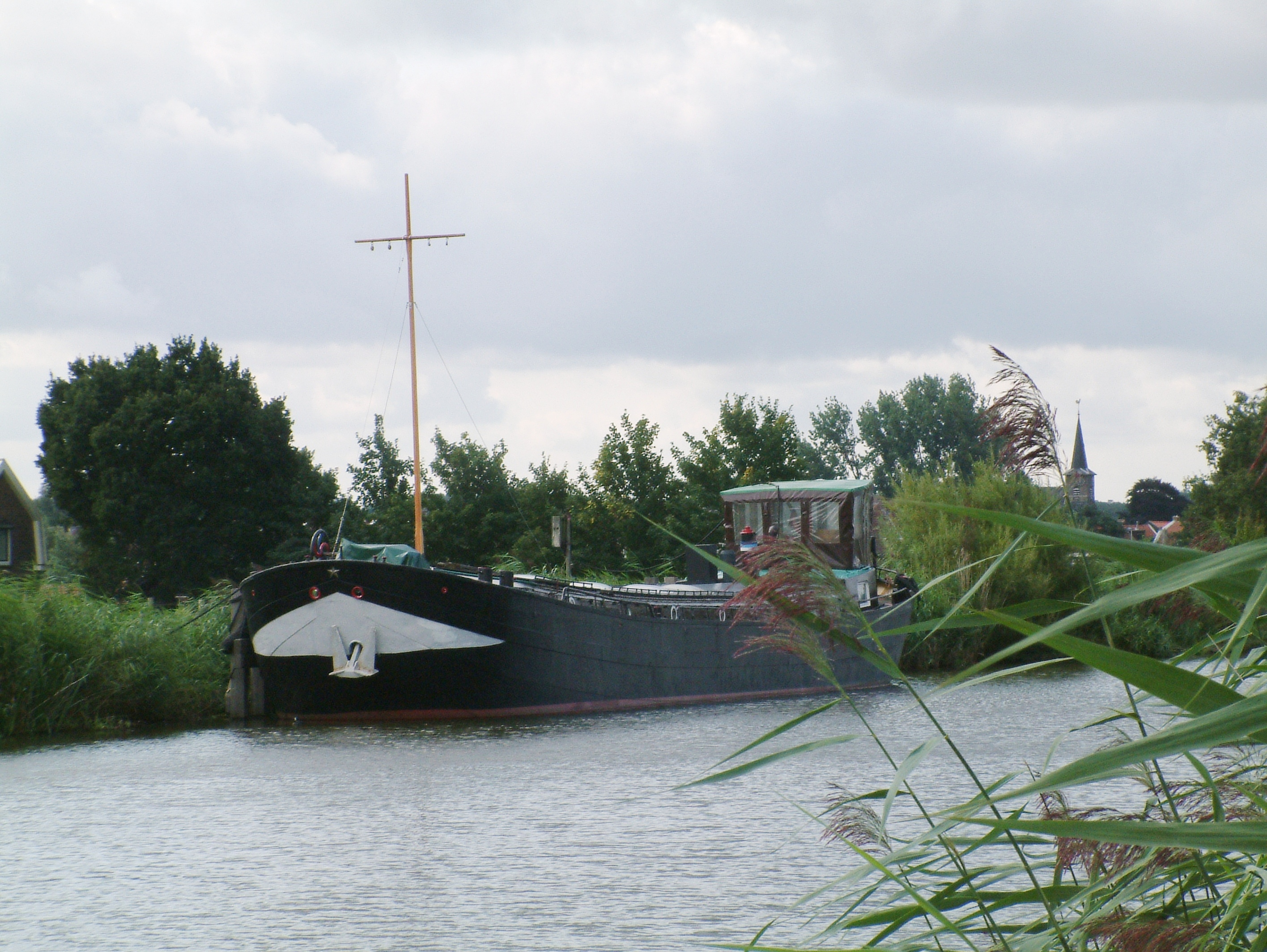 Het wachtschip DE HOOP van Scoutinggroep De Argonauten uit Rotterdam.